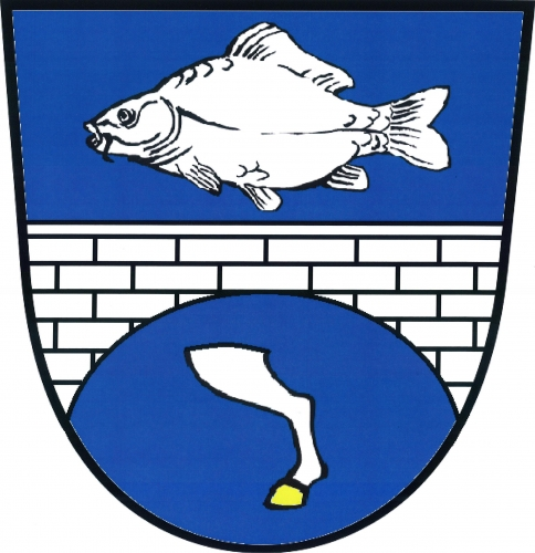 znak, Tchořovice, okres Strakonice